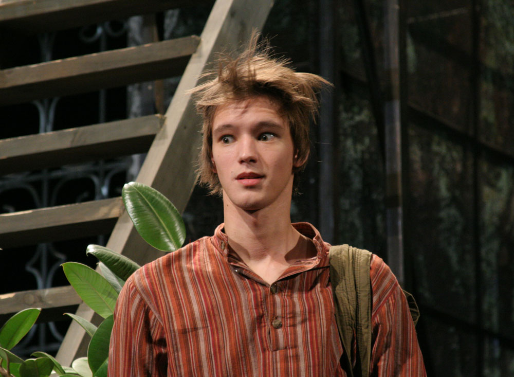 Сцена из спектакля Саратовского академического театра драмы «Преступление и наказание» по роману Ф.М. Достоевского. Максим Локтионов - Николка